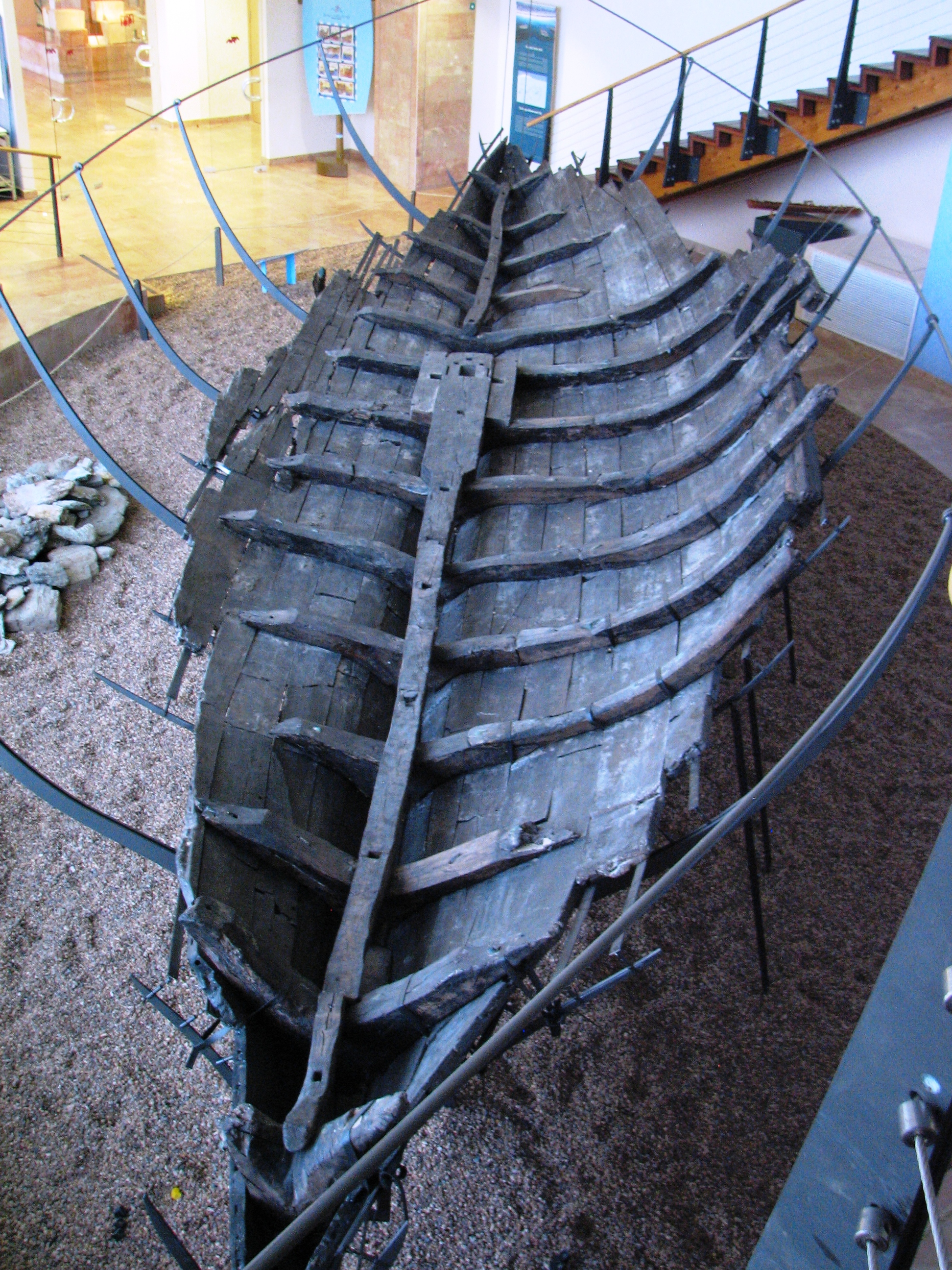 The Ma'agan Michael Ship is a 5th-century BC merchantman discovered off the coast of Ma'agan Michael, Israel, in 1985. הספינה העתיקה ממעגן מיכאל, היא ספינת סוחר פניקית מעץ מסוף המאה החמישית לפנה"ס שהתגלתה ב-1985 בים במרחק 70 מטר מחוף קיבוץ מעגן מיכאל בעומק של שני מטר הספינה מבט על